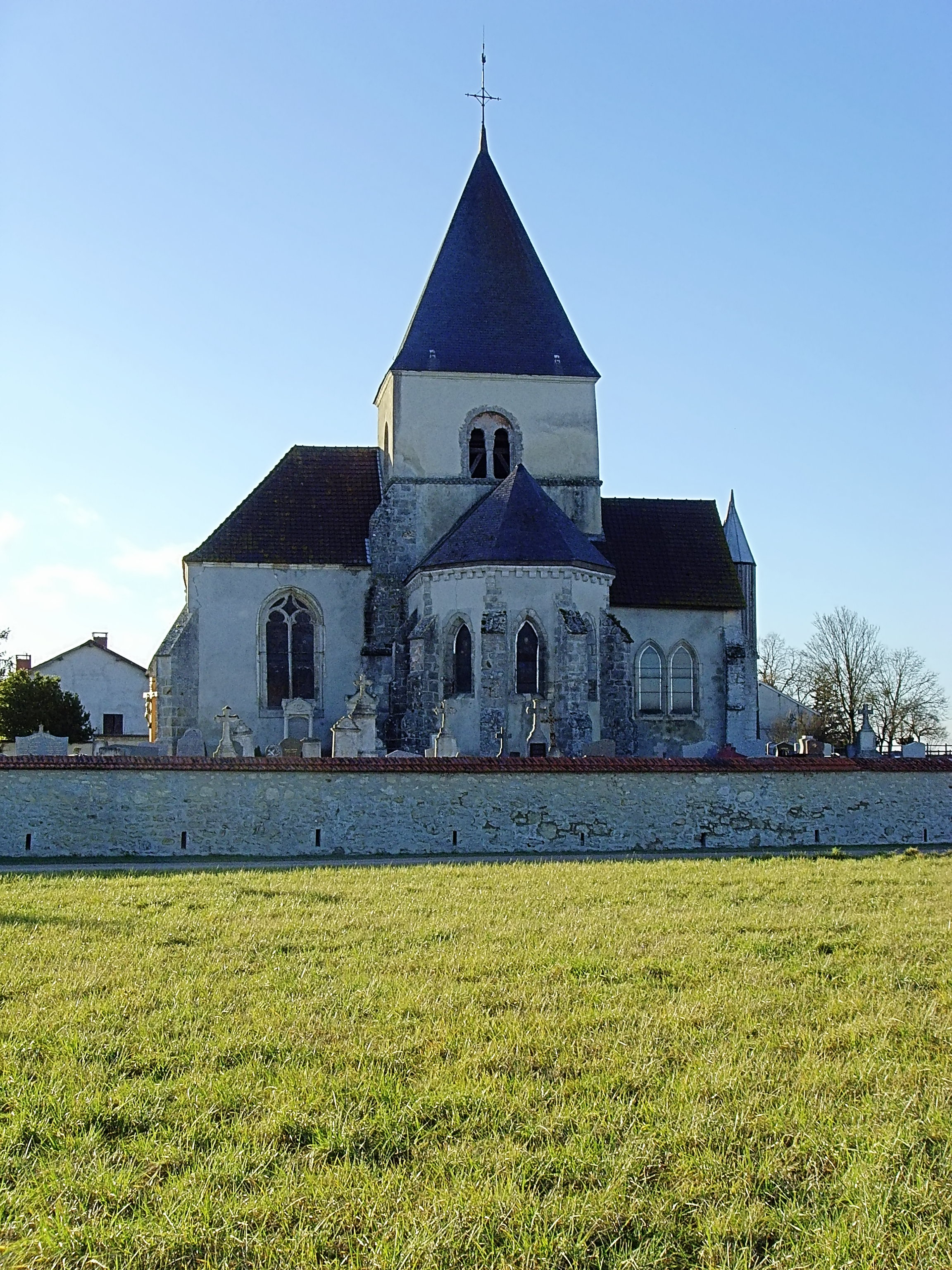 L'église de Bannes (Marne, France)